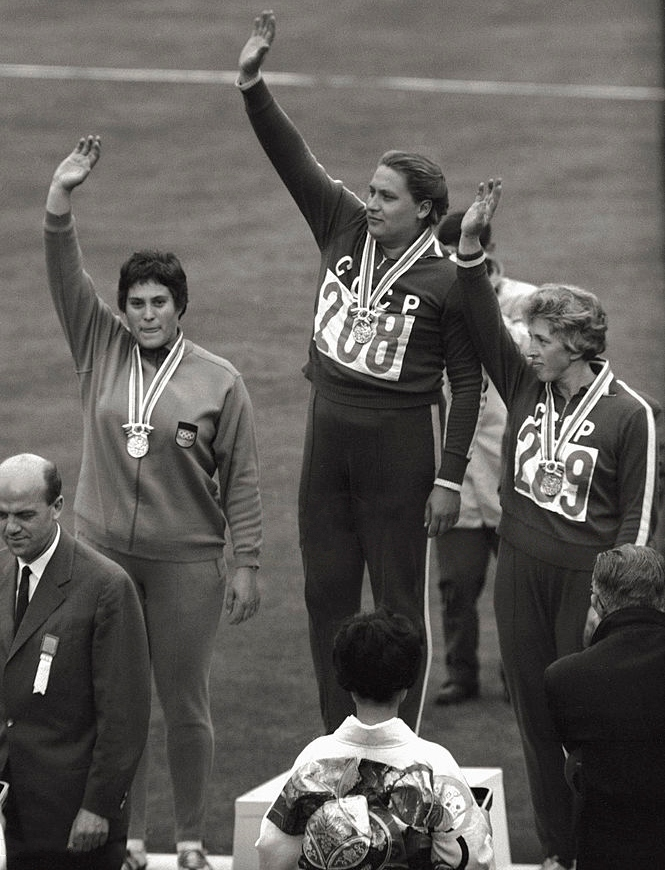 Renate Garisch, Tamara Press, Galina Zybina, Tokyo, 1964